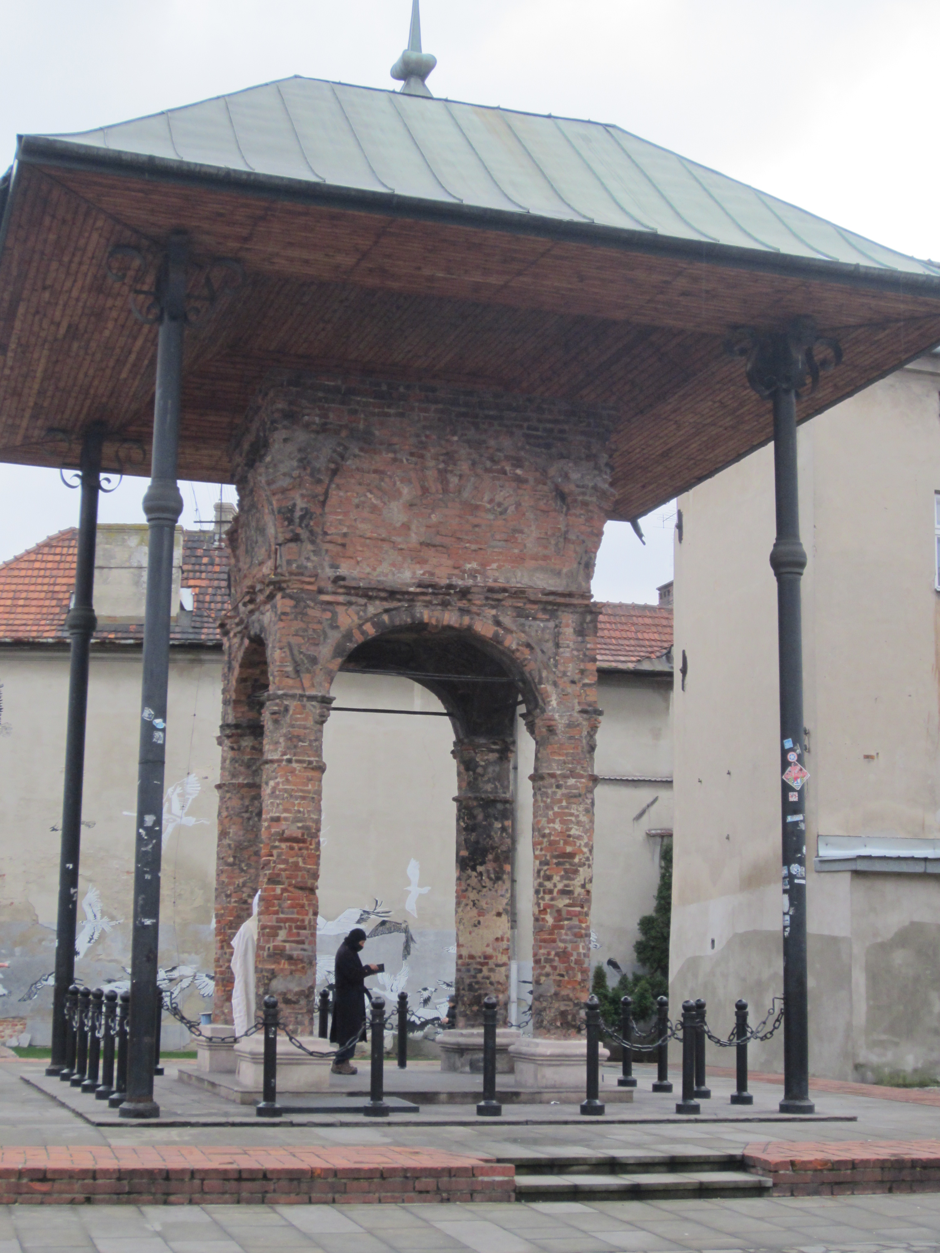 בית הכנסת בטרנוב, הבימה ששרדה (2).jpg